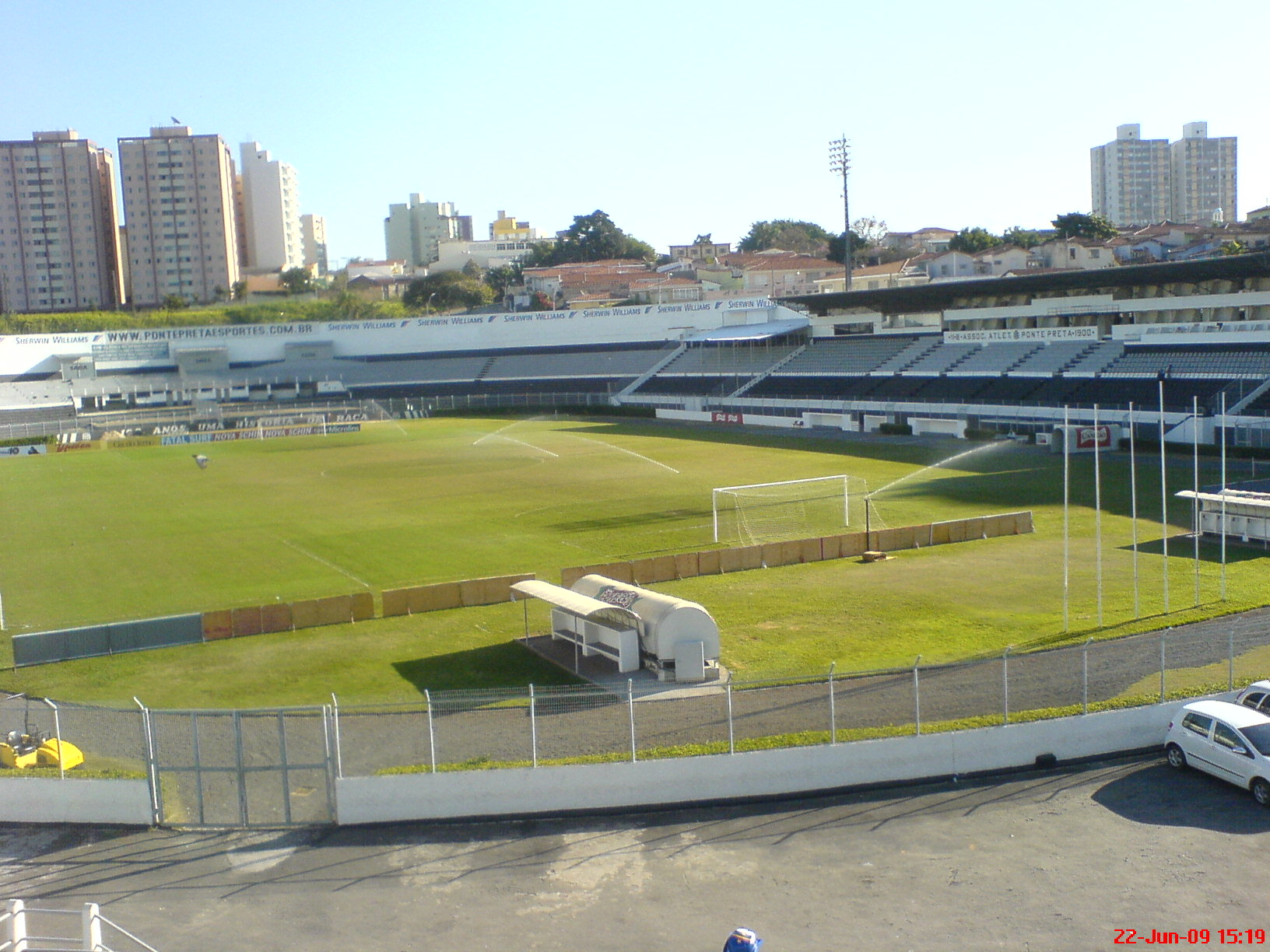 Vista geral, campo, arquibancada e prédios ao redor do estádio da Ponte Preta.